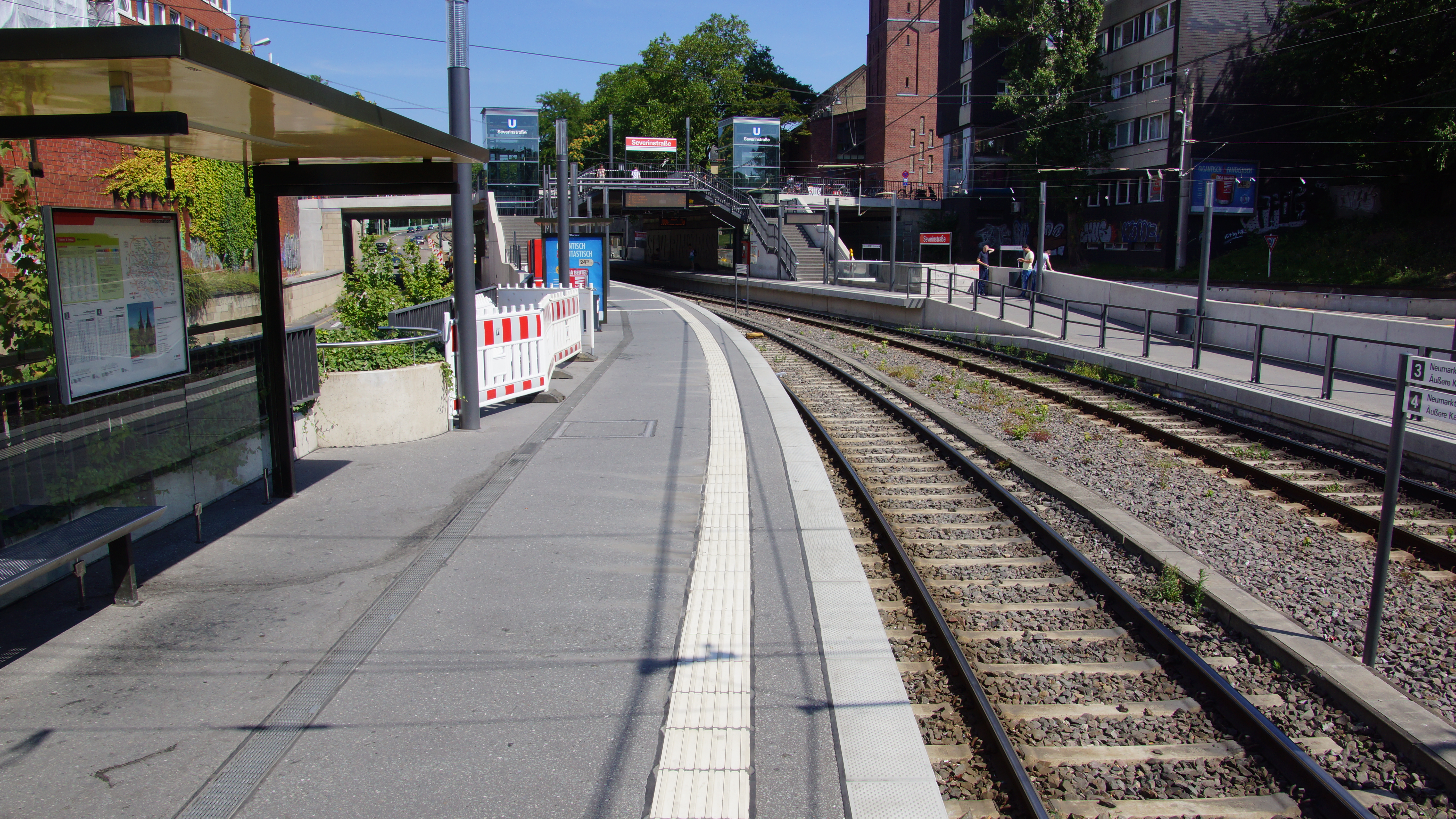 U-Bahnhof Severinstraße (oberirdischer Teil) der Stadtbahn Köln nach der Umstellung auf Hochbahnsteige